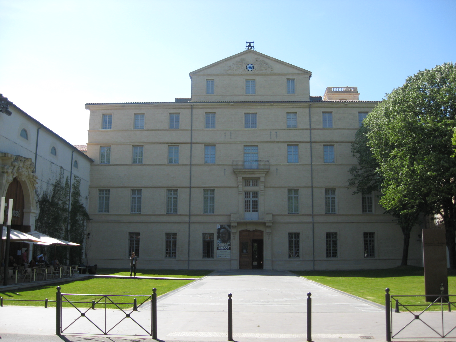 Façade du musée Fabre, Montpellier, (Hérault) France